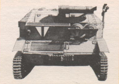 Mały czołg rozpoznawczy TK, model seryjny: widok z tyłu.